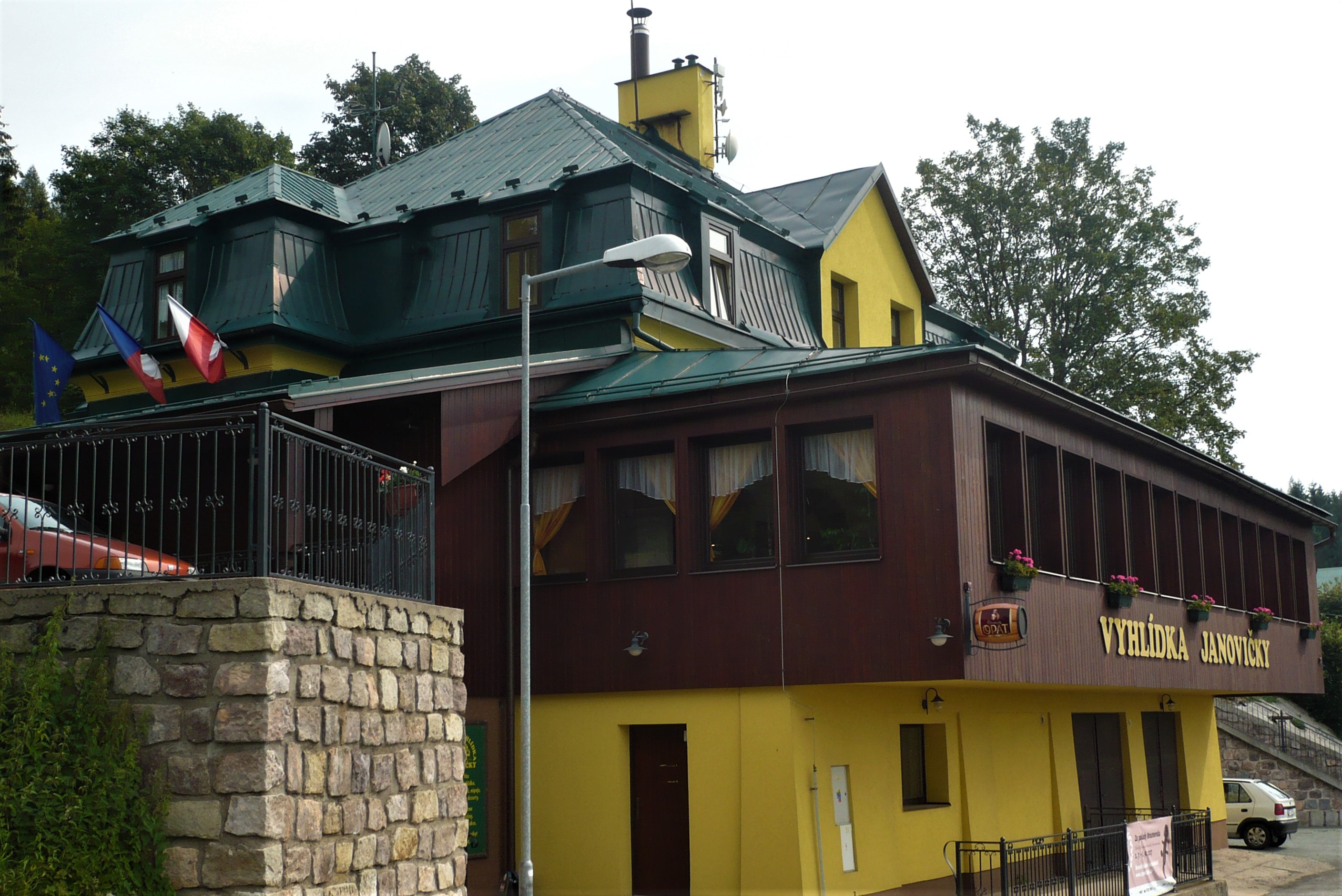 Janovicky. Vyhlidka Janovicky